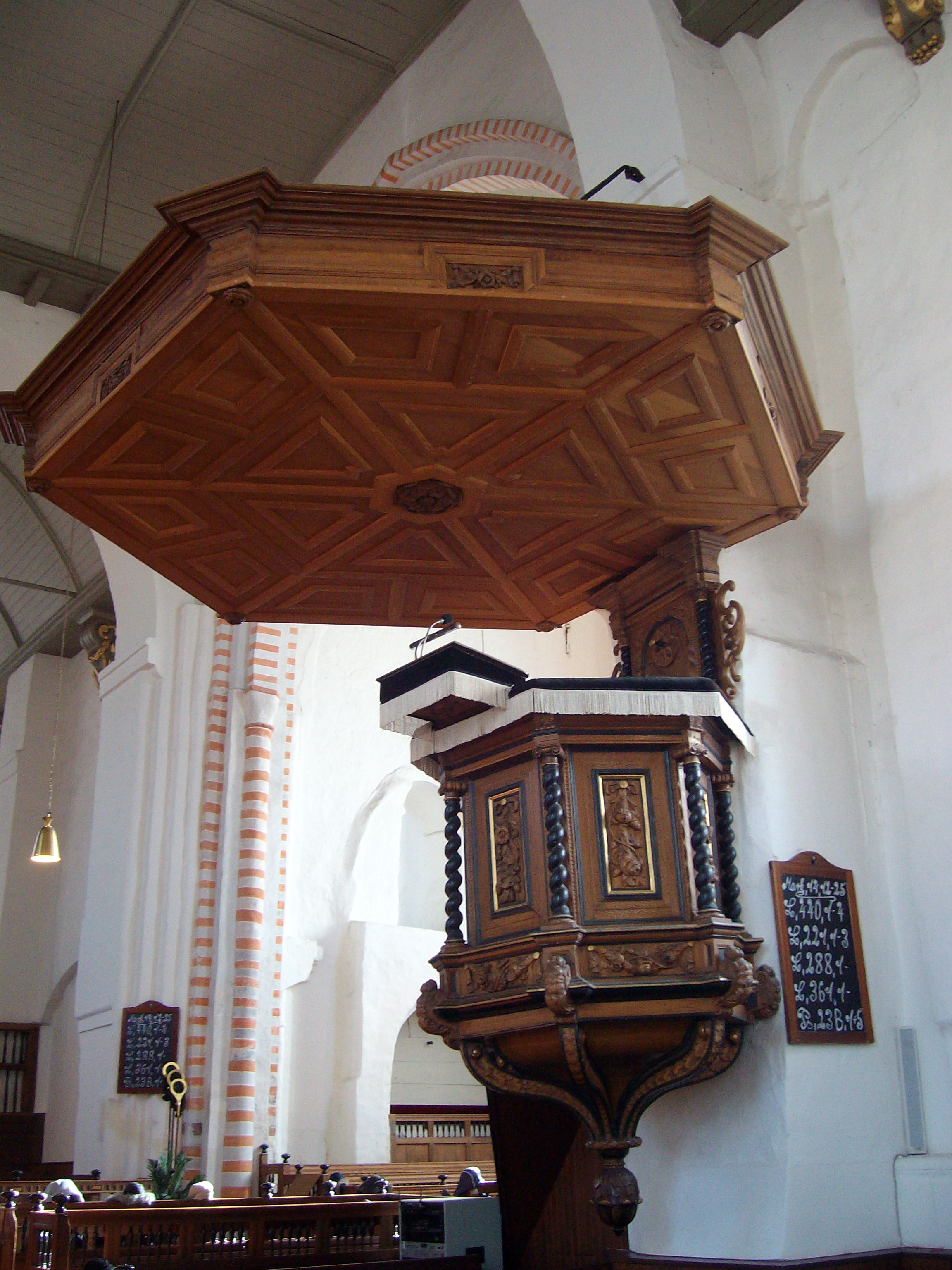 Kanzel der Ref. Kirche Bunde, Ostfriesland